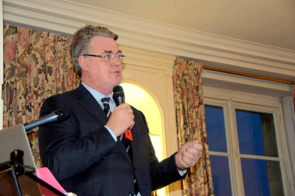 Conclusion par Jean-Paul Delevoye, président du Conseil Économique, Social et Environnemental.